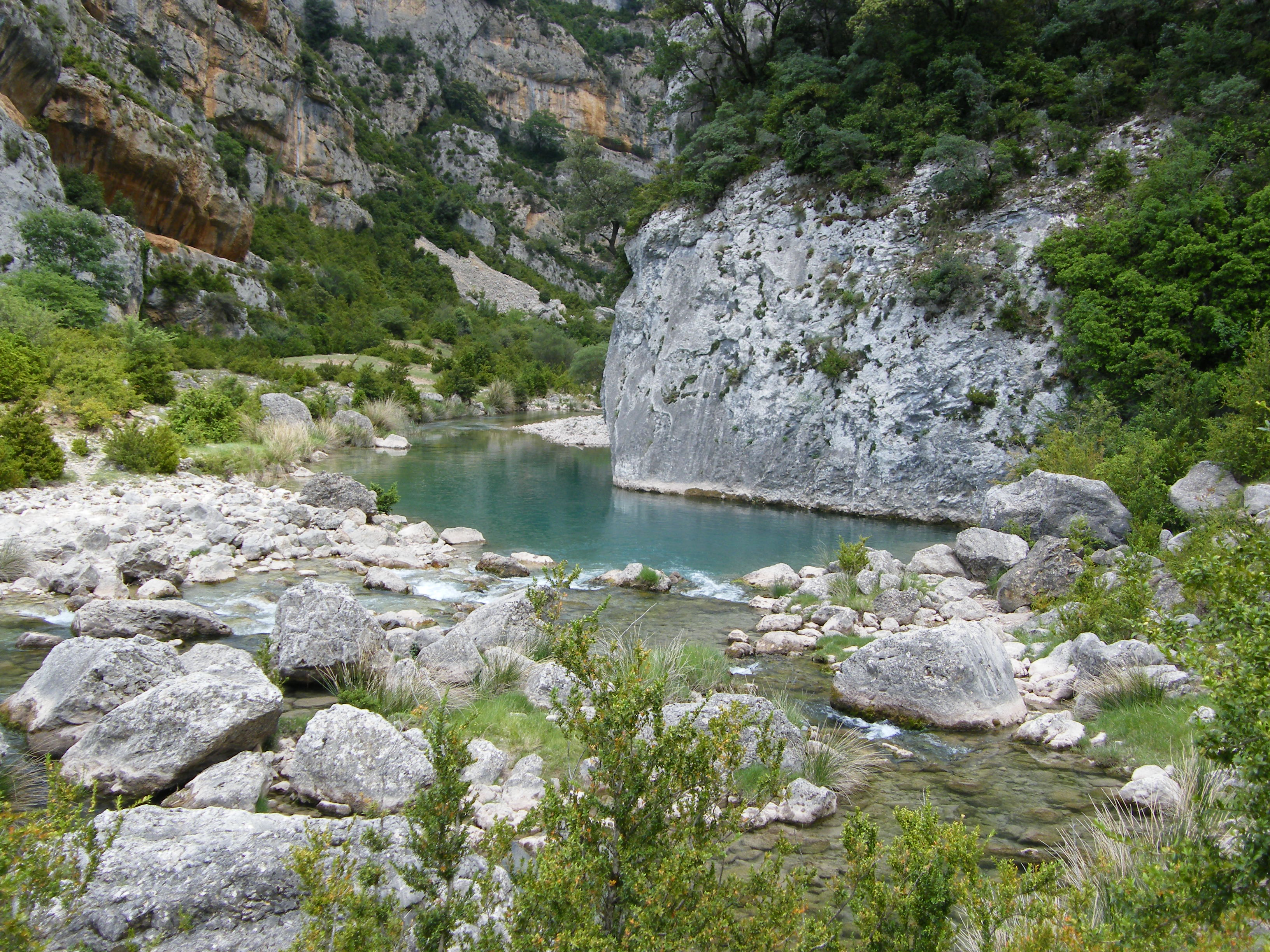 Alcanadre, début de la section de canyoning nommée Barrasil. Le point de vue est situé entre La Piscineta et l'arrivée du sentier d'accès (dans les roches ocres, à gauche, en haut de l'image)